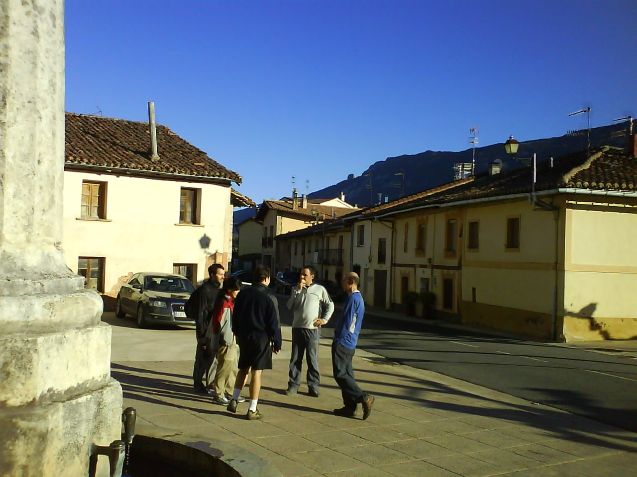 Lagrango ikuspegia